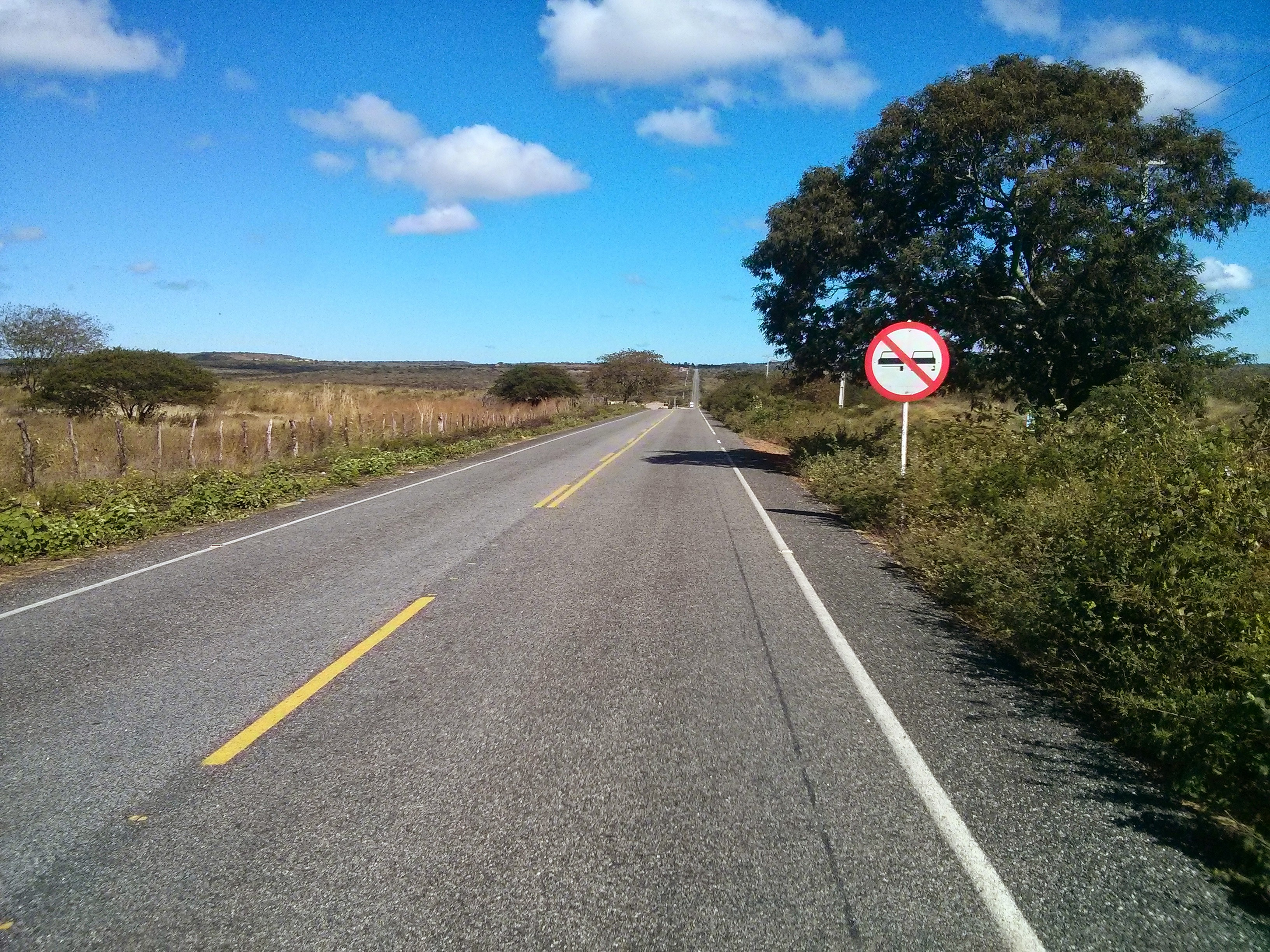 Rodovia PB-306 Paraíba Brasil em 13 de Agosto de 2014